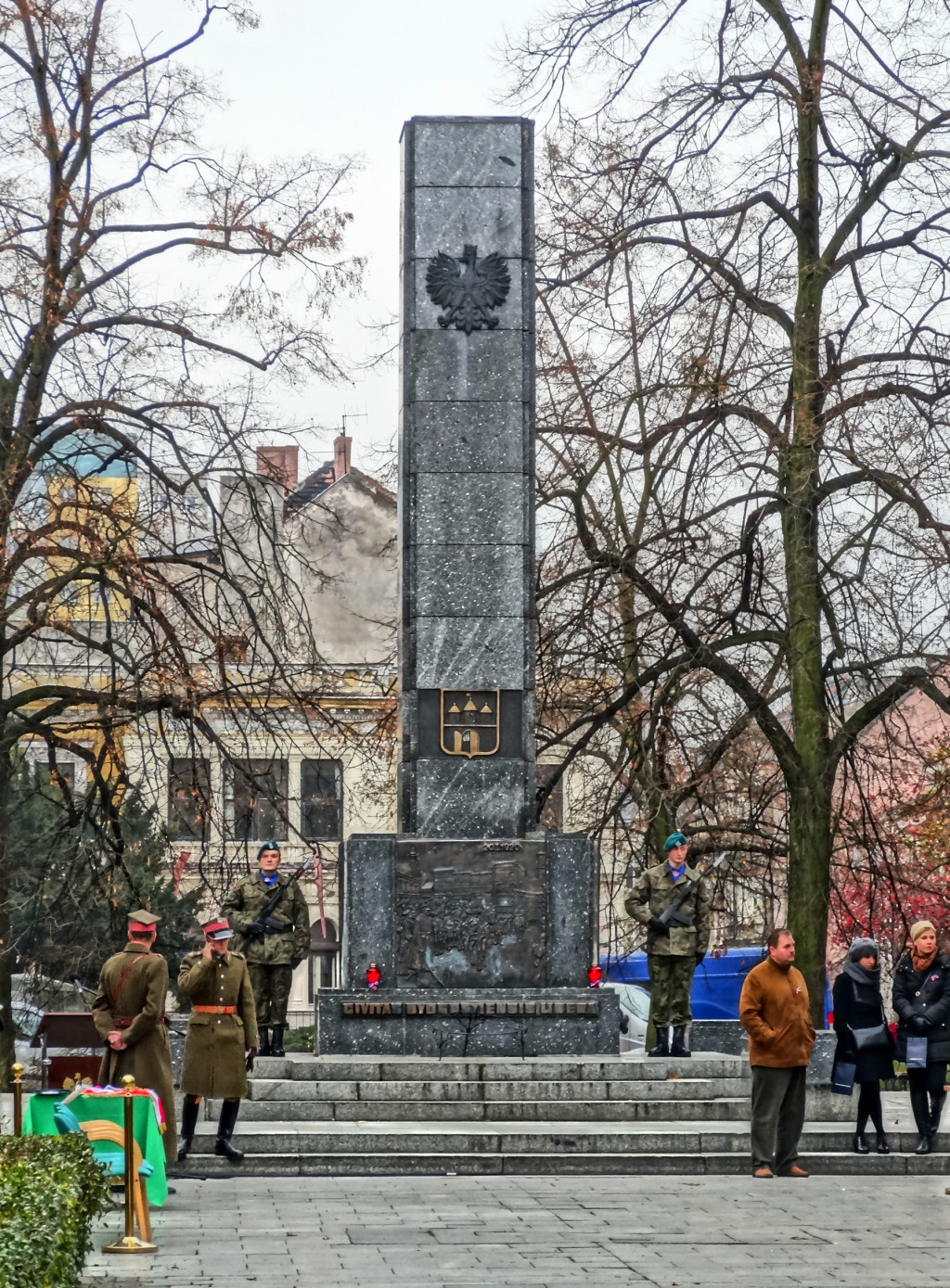 Pomnik Wolności w Bydgoszczy podczas obchodów Święta Niepodległości 11 listopada 2013 roku